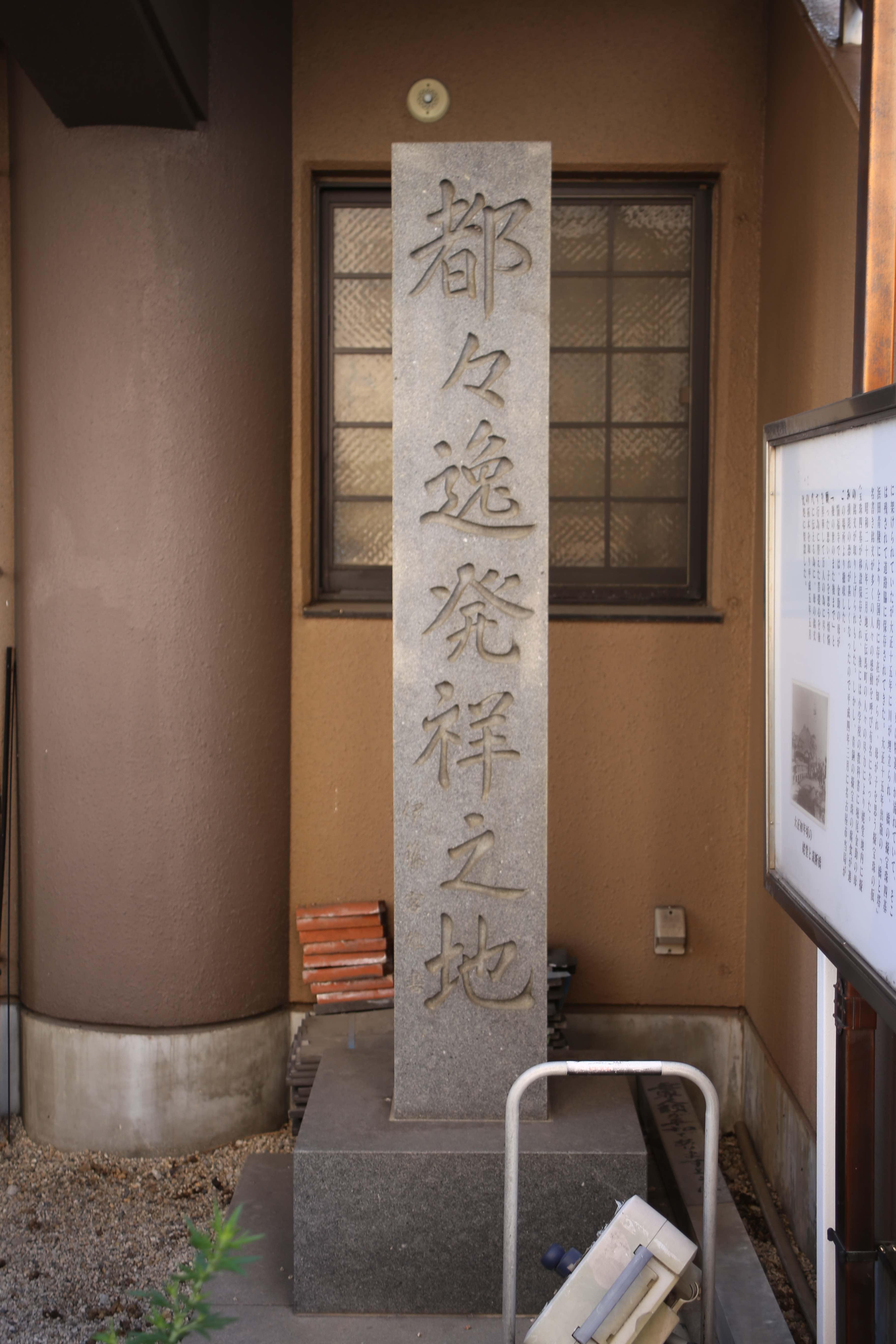 名古屋市熱田区伝馬二丁目の「都々逸発祥之地」碑